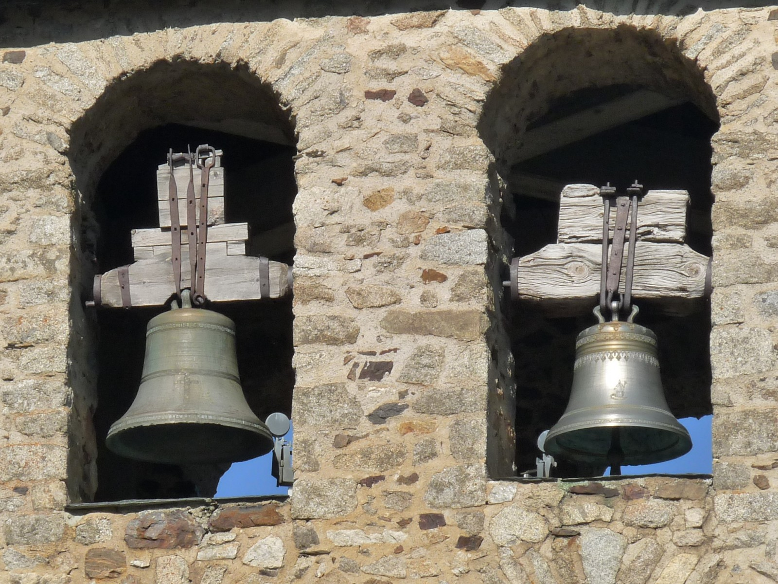 Eglise d'Ayguatébia, Pyrénées-Orientales, France